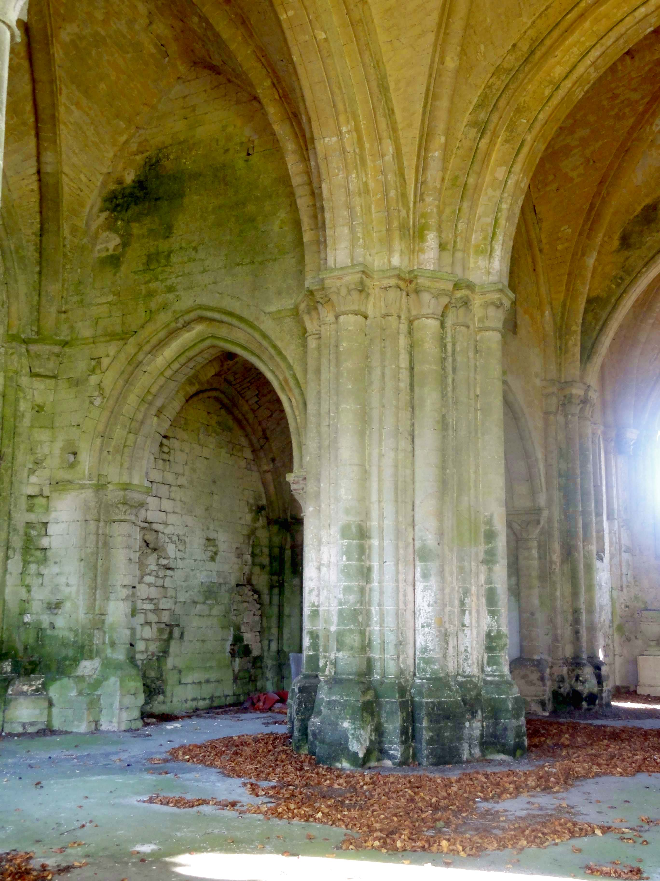 Croisée du transept, vue vers le nord-est.